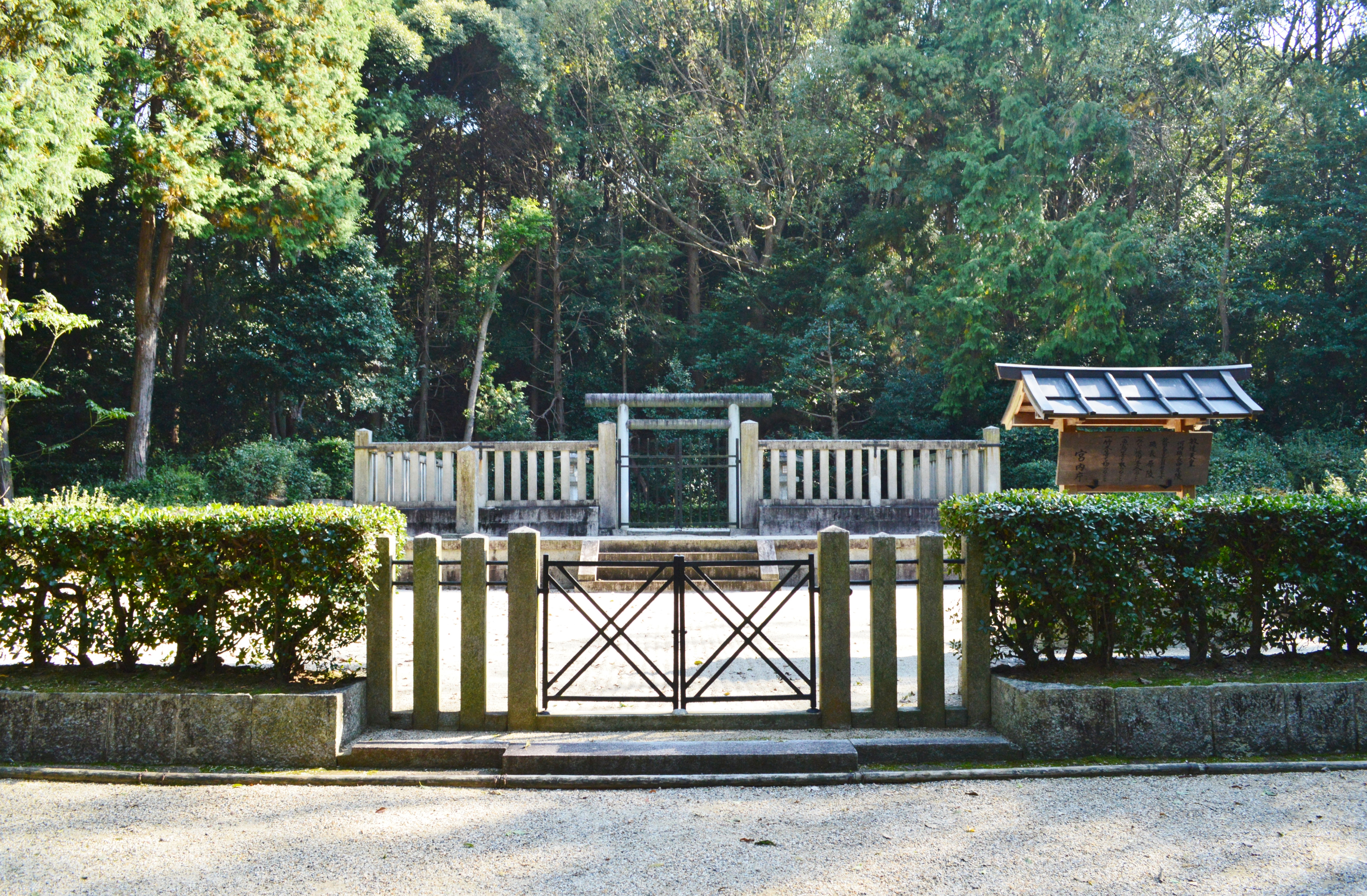 敏達天皇河内磯長中尾陵・石姫皇女磯長原陵 拝所